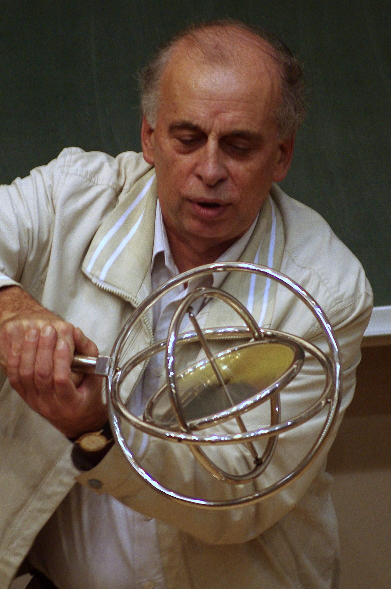 Koit Timpman. Güroskoobi demonstratsioon.